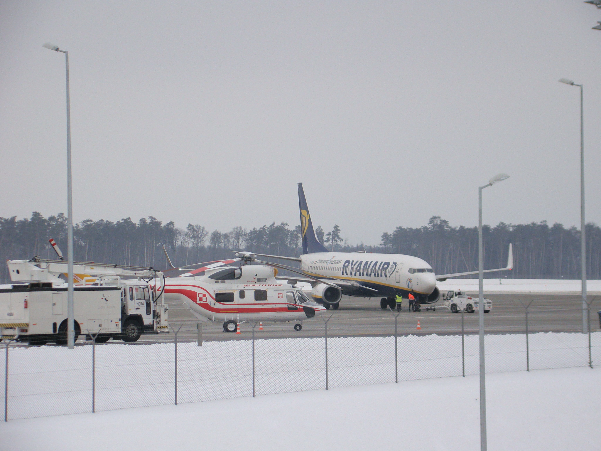 Śmigłowiec PZL W-3A VIP "Sokół" o numerze taktycznym 1014 oraz Boeing 737-800 lini Ryanair na płycie Portu Lotniczego Lublin. Świdnik, 17.12.2012.